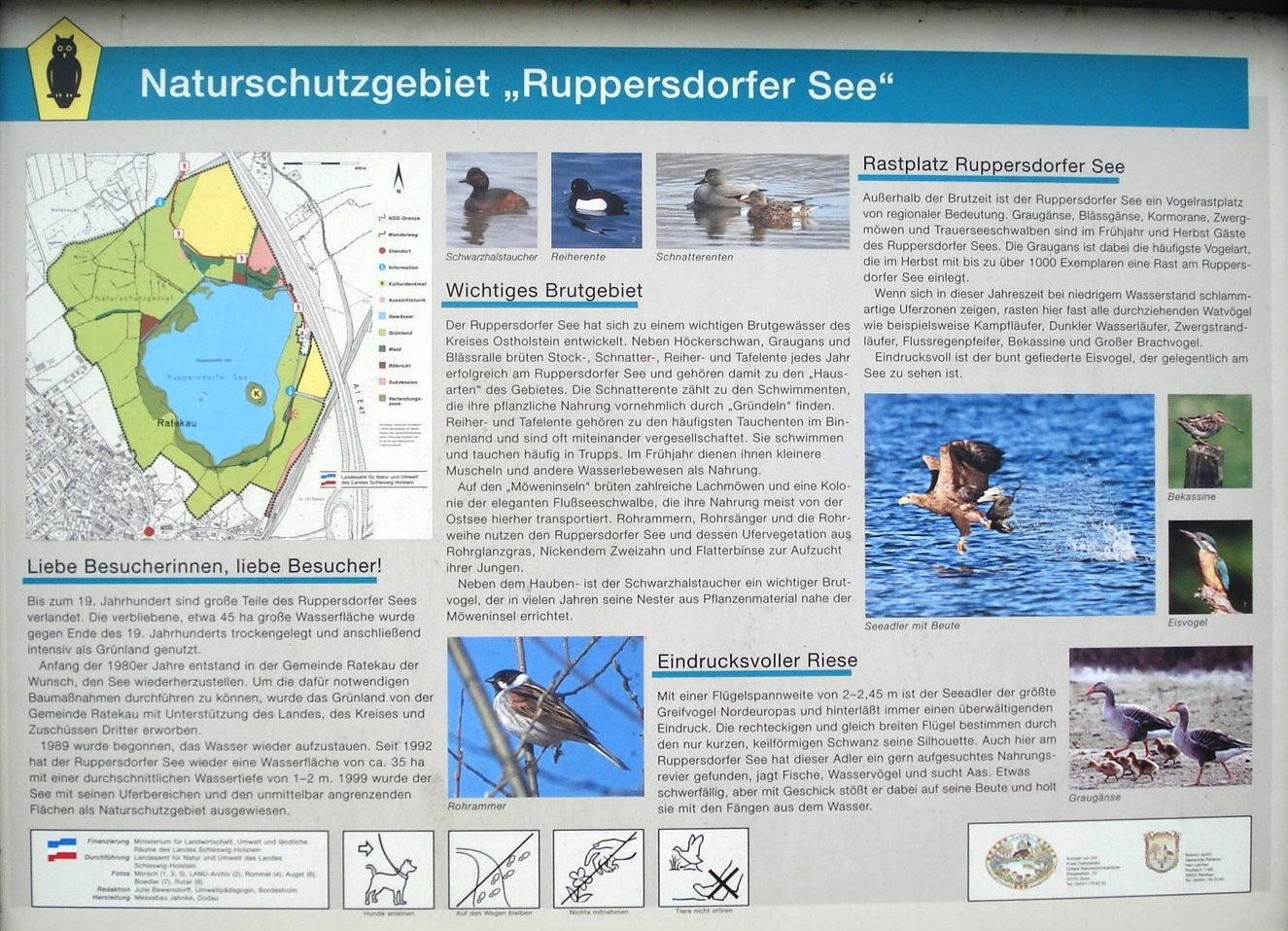 Informationstafel zum Naturschutzgebiet „Ruppersdorfer See“ (NSG 180) in Ratekau